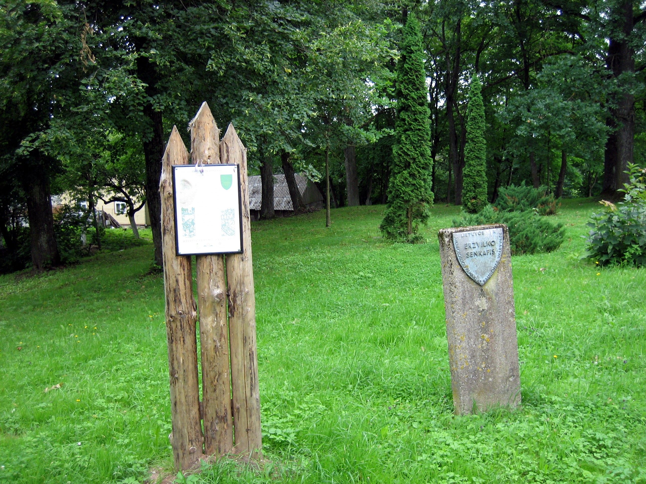 Eržvilko senkapis